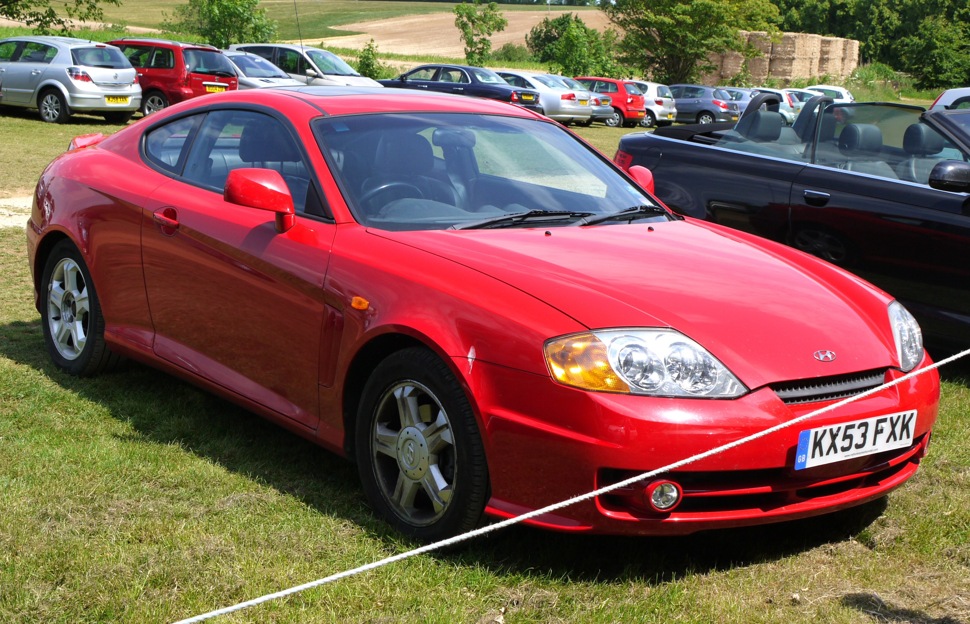 Panasonic G1 14-45 Lens iA mode.